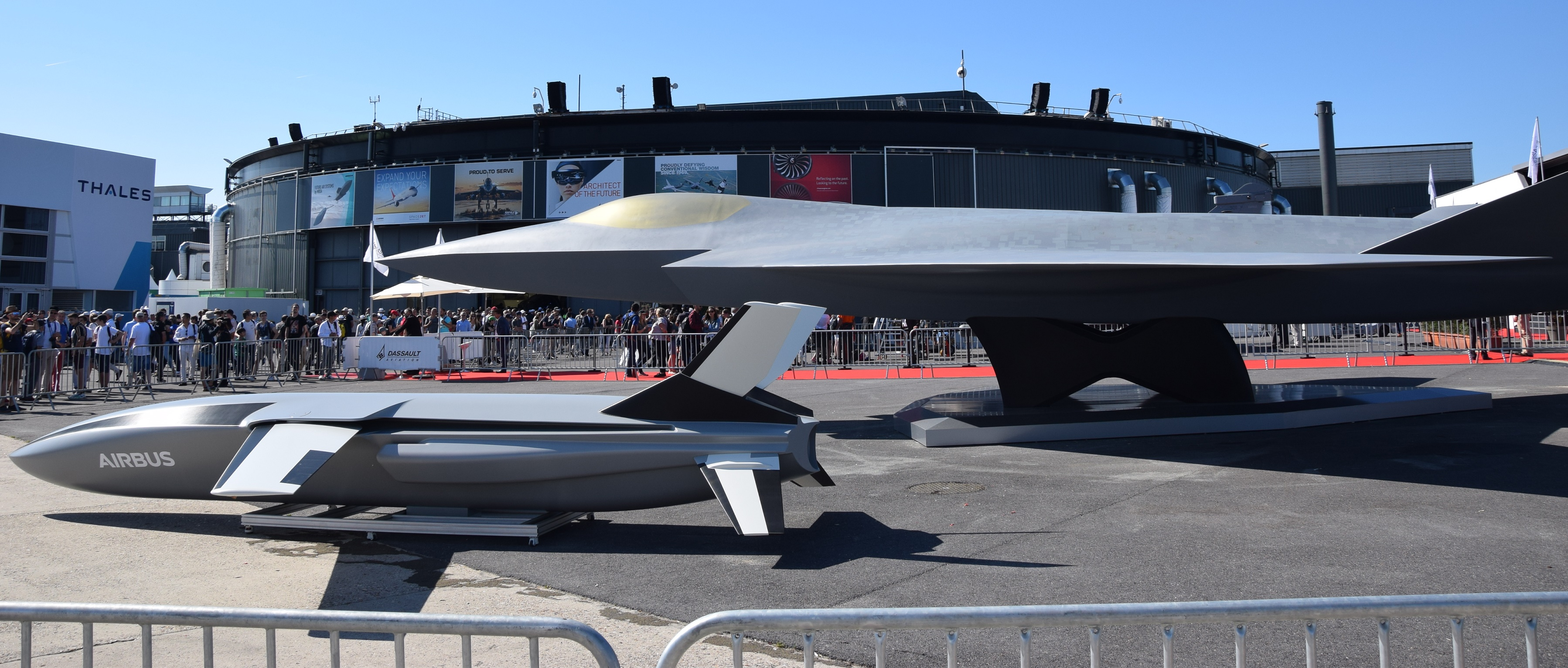 Maquette échelle 1 du projet d’avion de combat de nouvelle génération (Next Generation Fighter) faisant partie du système de combat aérien futur (SCAF), accompagné des effecteurs déportés. Les maquettes sont présentées au stand de Dassault Aviation au salon du Bourget 2019.